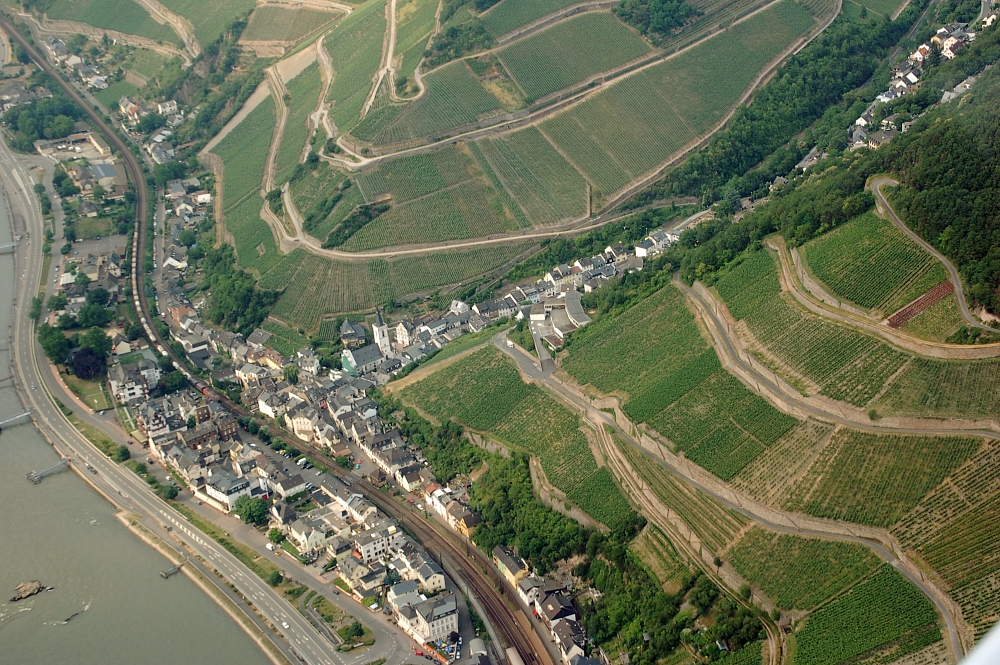 Assmannshausen, Rhine Gorge, Germany